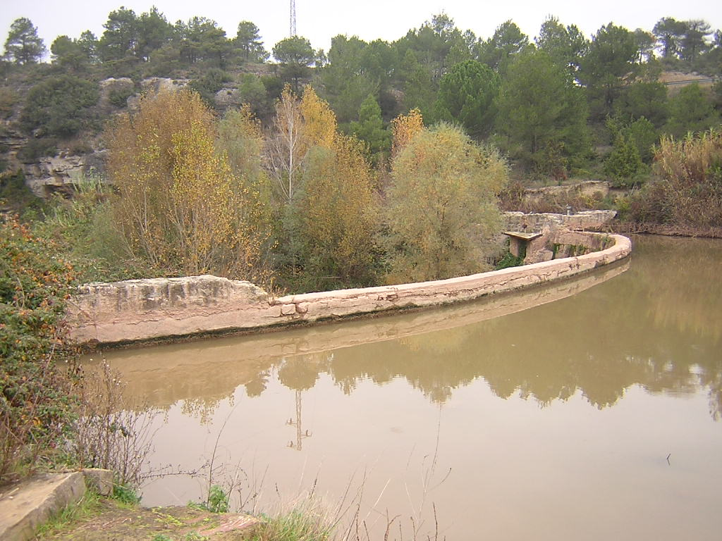 La Resclosa dels Campassos (Monistrol de Calders, Moianès)